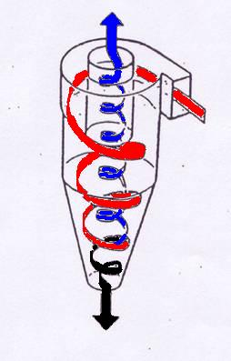 Schéma explicatif du fonctionnement d'un cyclone.